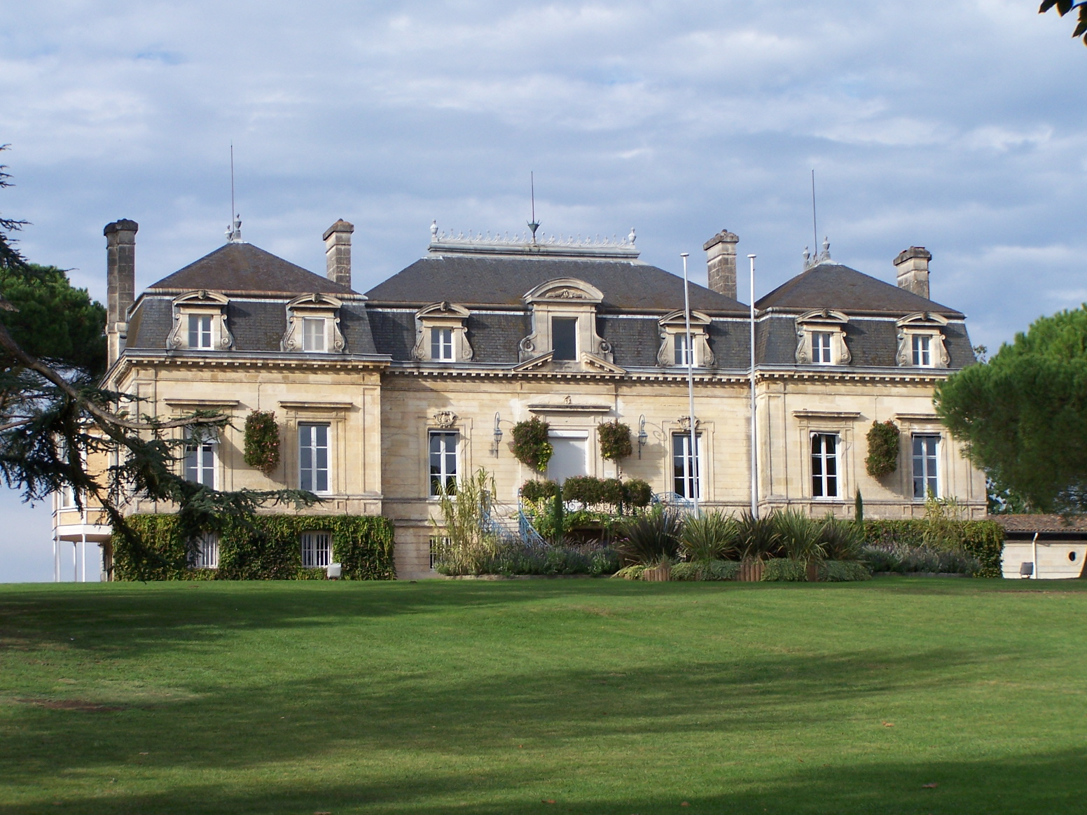 Chateau de la Mairie d'Artigues pres Bordeaux